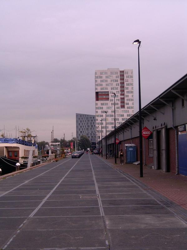 Veemkade in Amsterdam. Eigen werk.